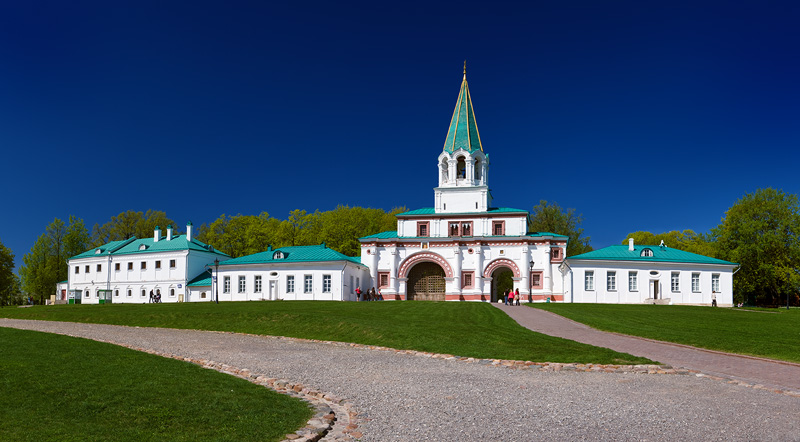 Усадьба «Коломенское» (Москва и Московская область, Москва, Андропова проспект, 31, 39)